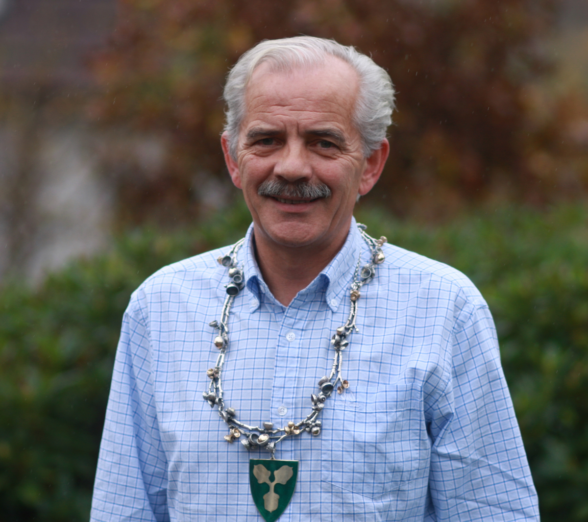 Olav Hafstad, mayor of Lund